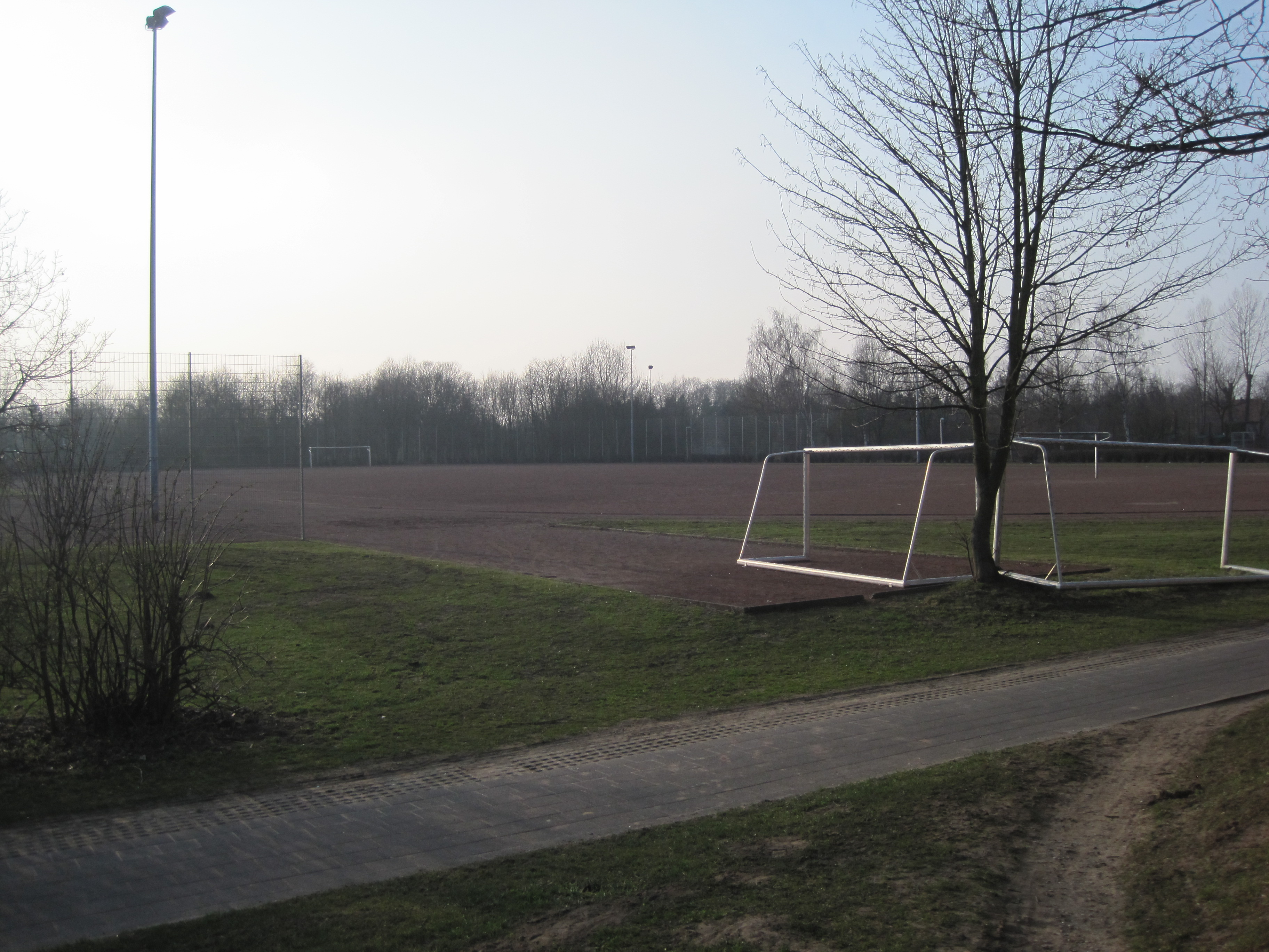 Das Foto zeigt den Sportplatz des Galilei-Gymnasiums Hamm.